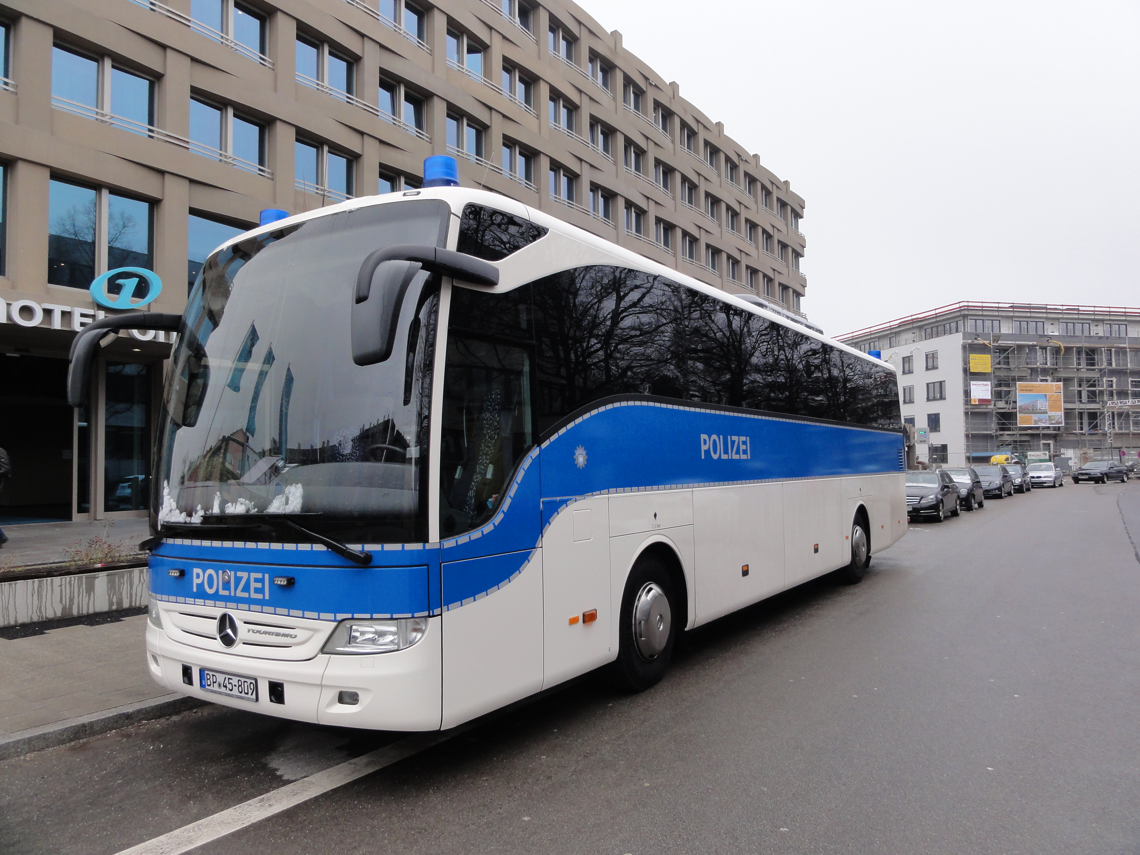 Mercedes-Benz Tourismo der (dt.) Bundespolizei